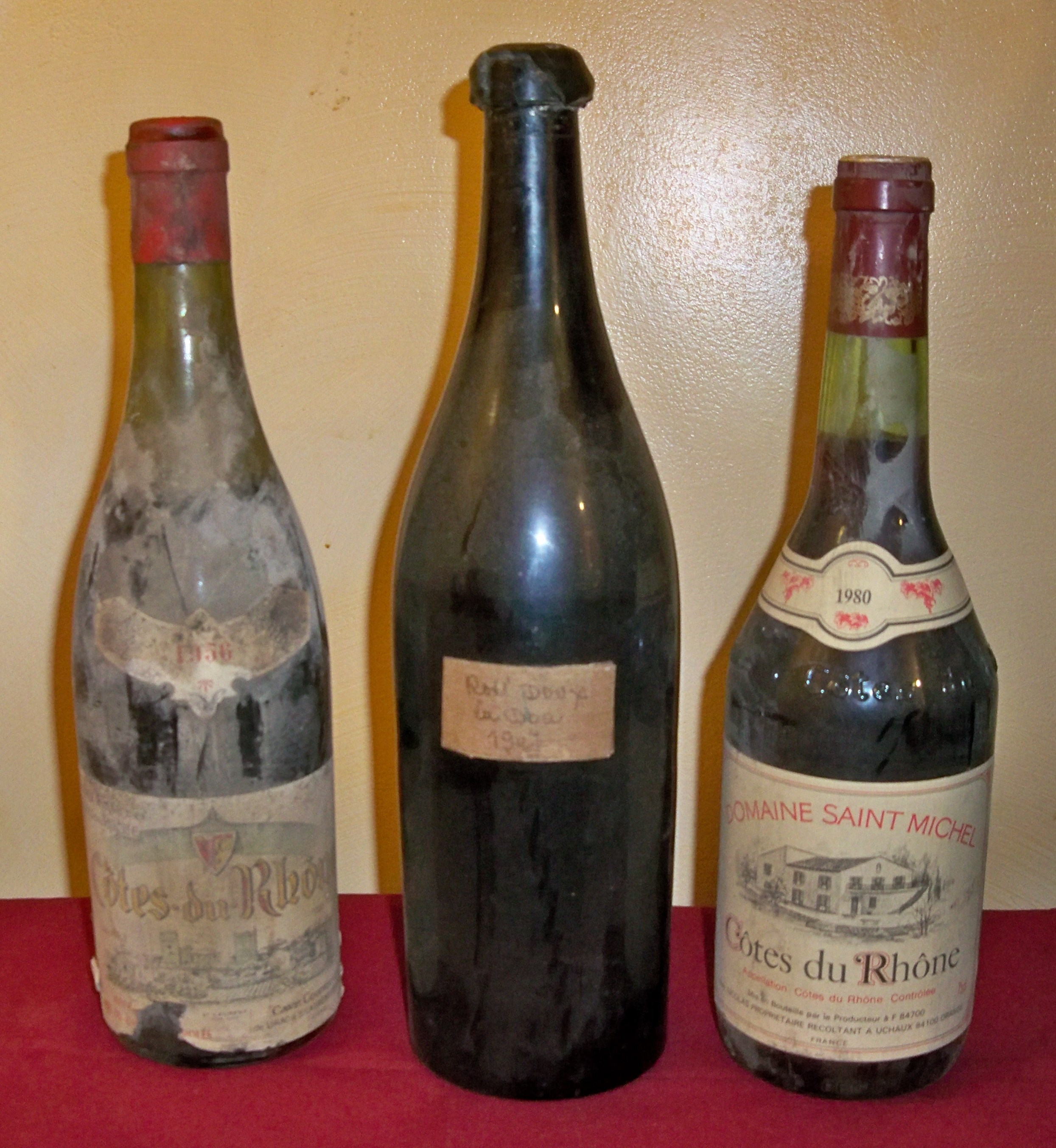 vieux millésimes de Cotes de Rhône